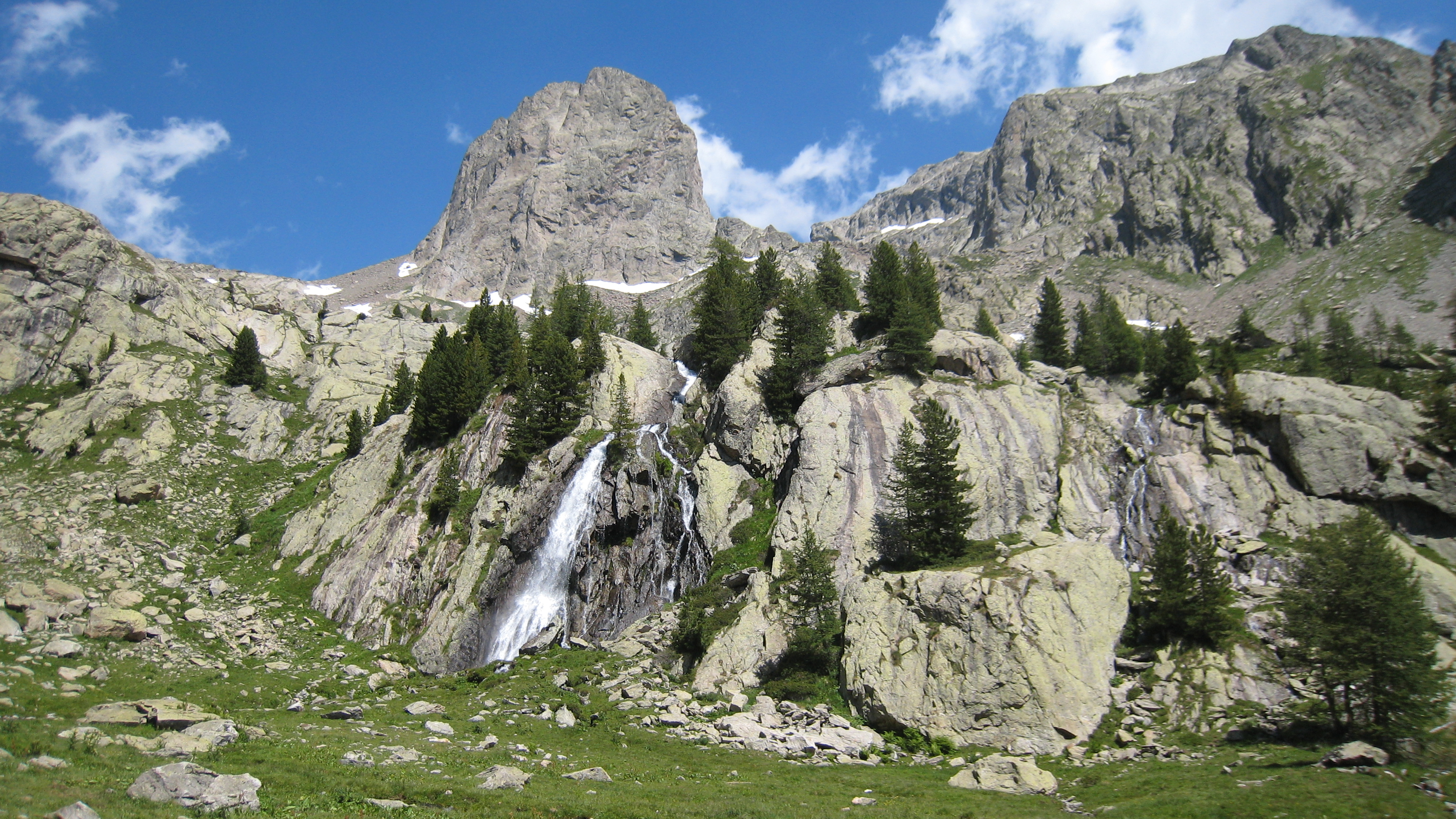 La Cougourde et son environnement